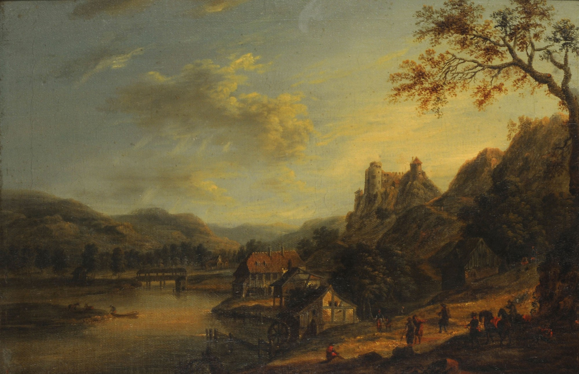 "Paisaje"